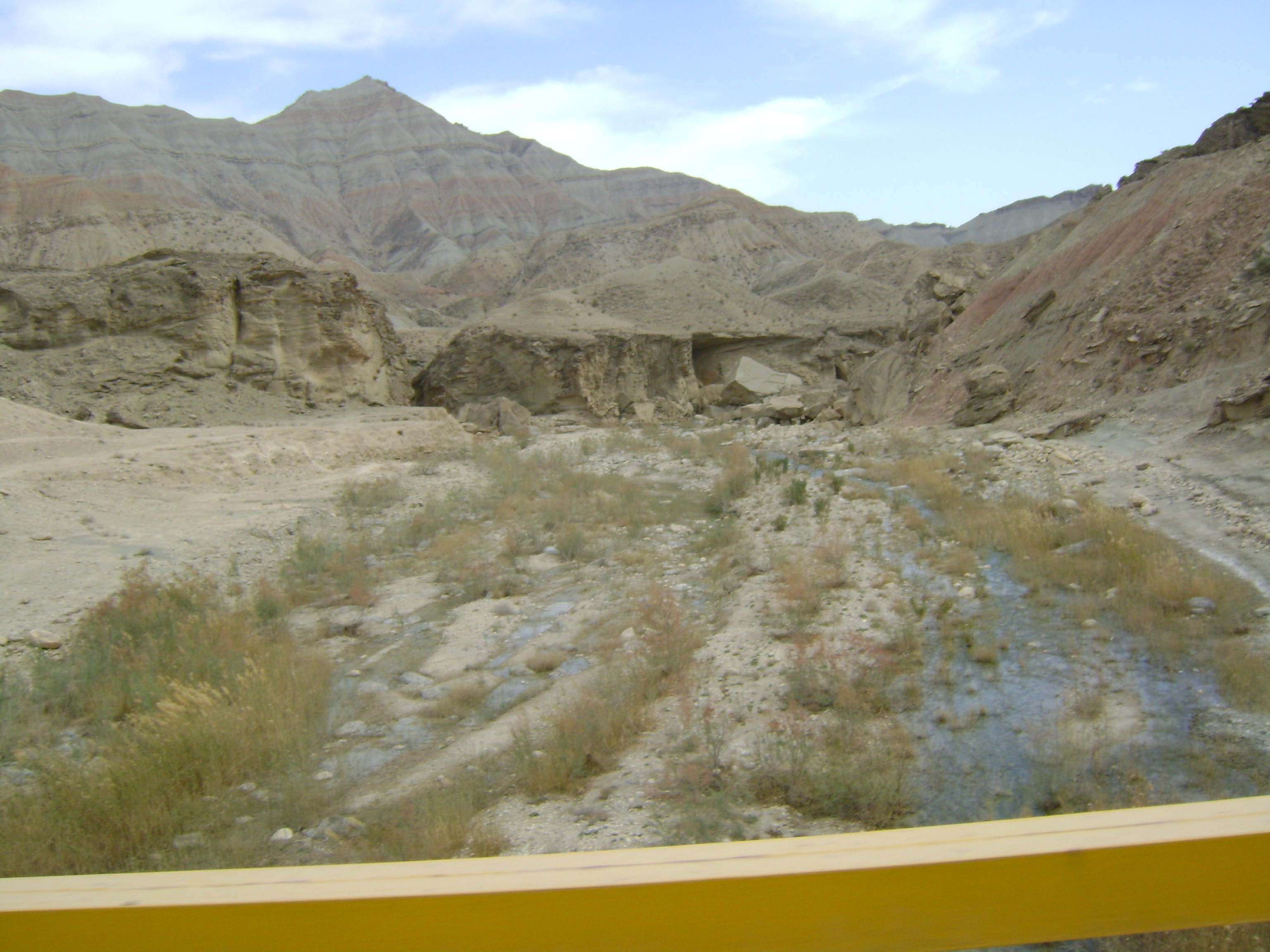 پل فلزی